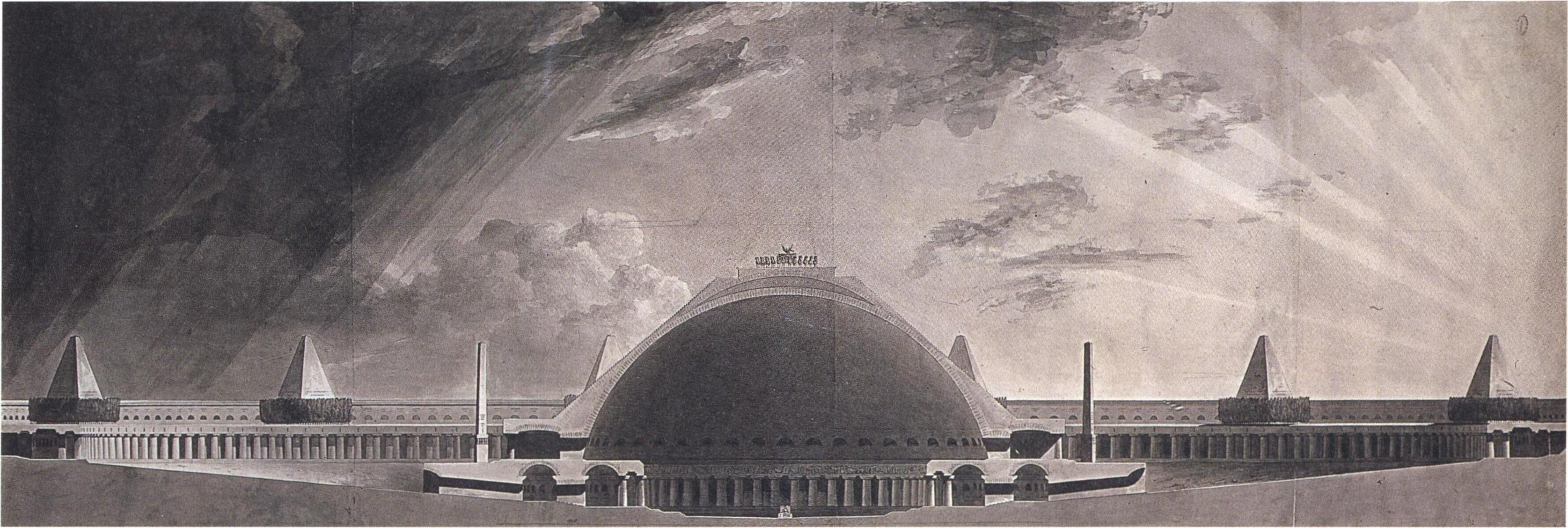 Un monument sépulcral pour les souverains d'un grand empire, deuxième grand Prix de Rome, coupe